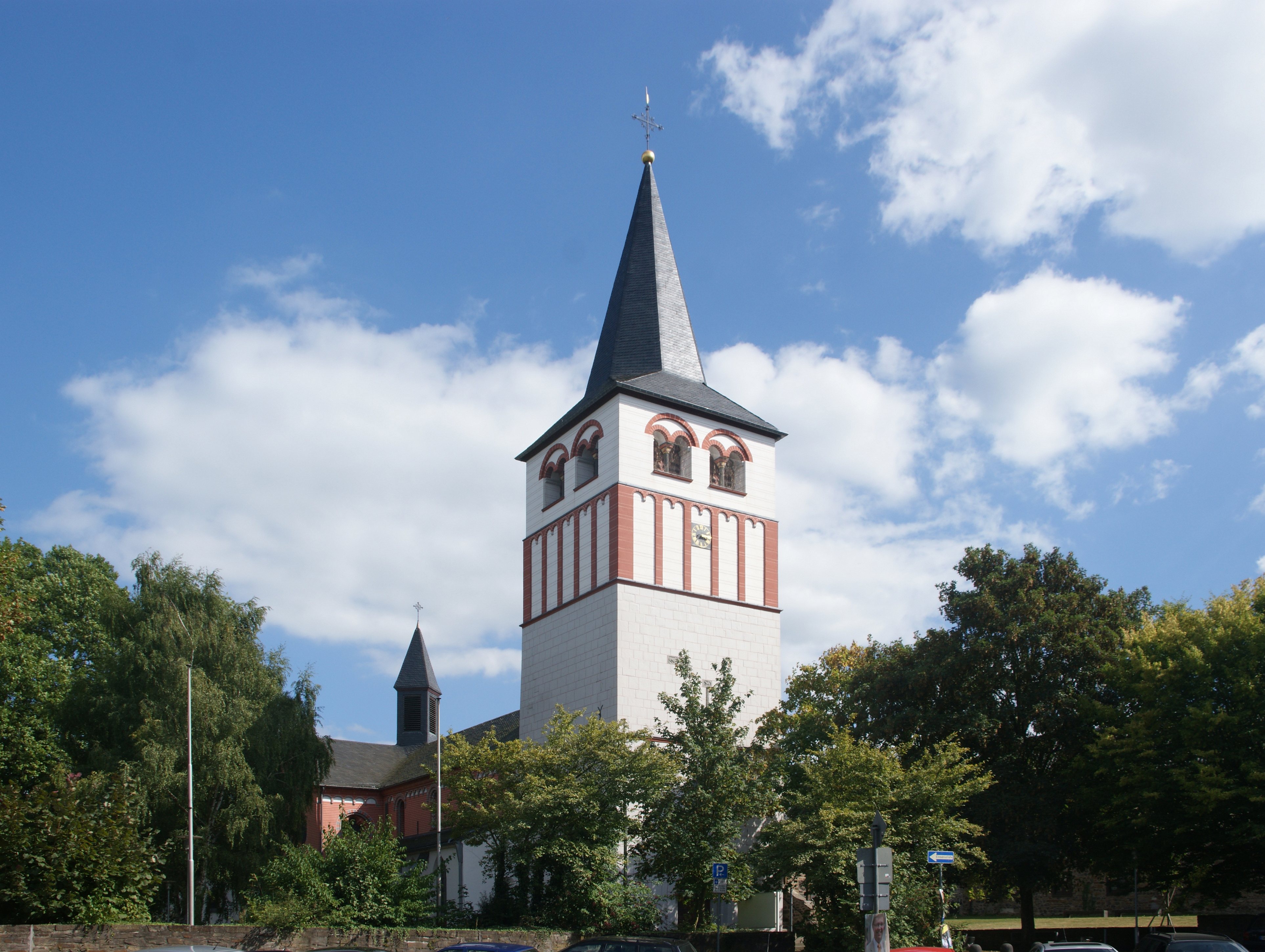 Probsteikirche Sankt Pankratius in Oberpleis, Königswinter